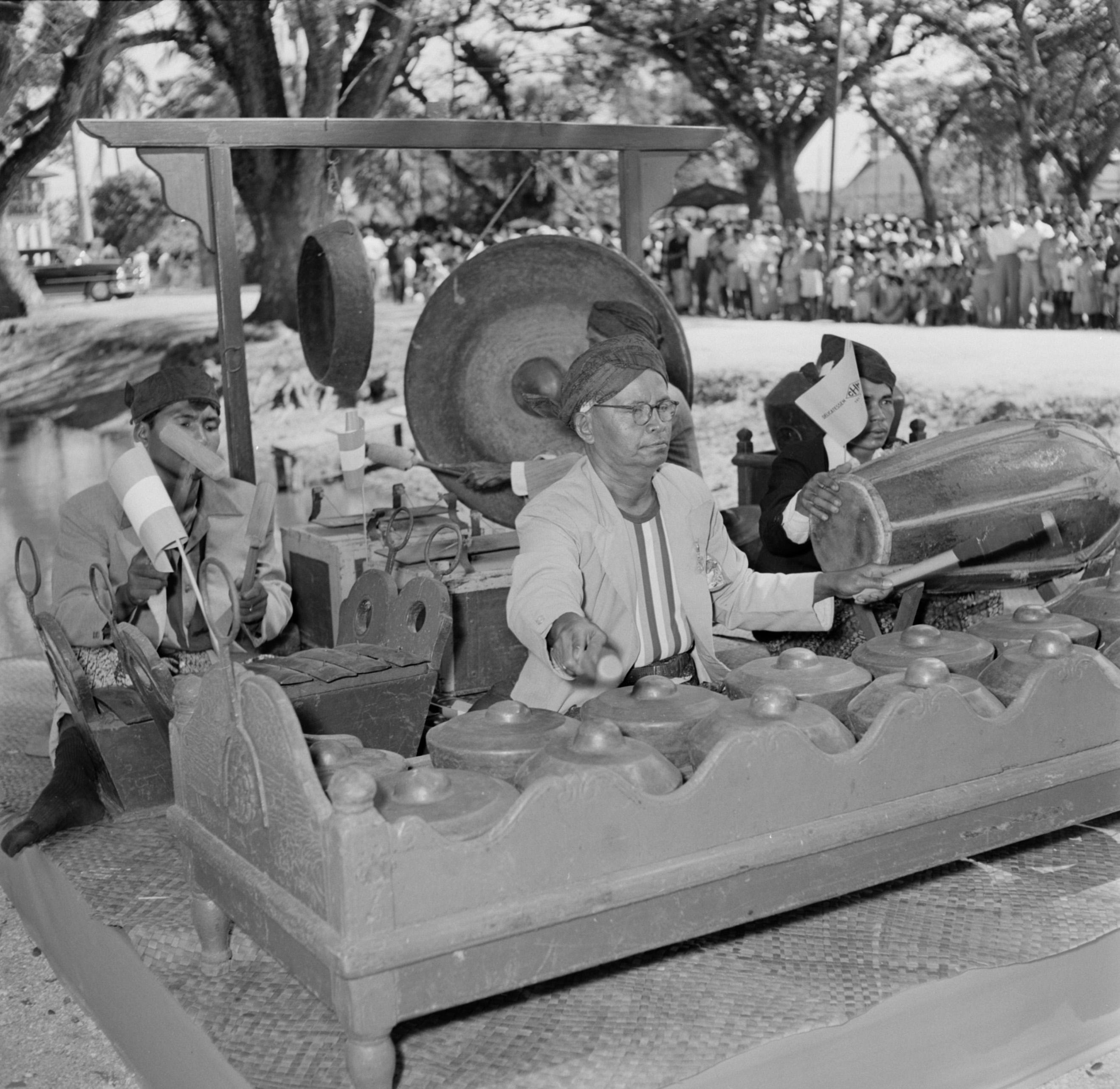 Collectie / Archief : Fotocollectie Van de Poll Reportage / Serie : Nederlandse Antillen en Suriname ten tijde van het koninklijk bezoek van koningin Juliana en prins Bernhard in 1955 Beschrijving : Gamelanspeler in Mariënburg Datum : 1 november 1955 Locatie : Mariënburg, Suriname Trefwoorden : Javanen, inheemsen, muziek Persoonsnaam : Juliana, koningin Fotograaf : Poll, Willem van de Auteursrechthebbende : Nationaal Archief Materiaalsoort : Negatief (zwart/wit) Nummer archiefinventaris : bekijk toegang 2.24.14.02 Bestanddeelnummer : 252-4522